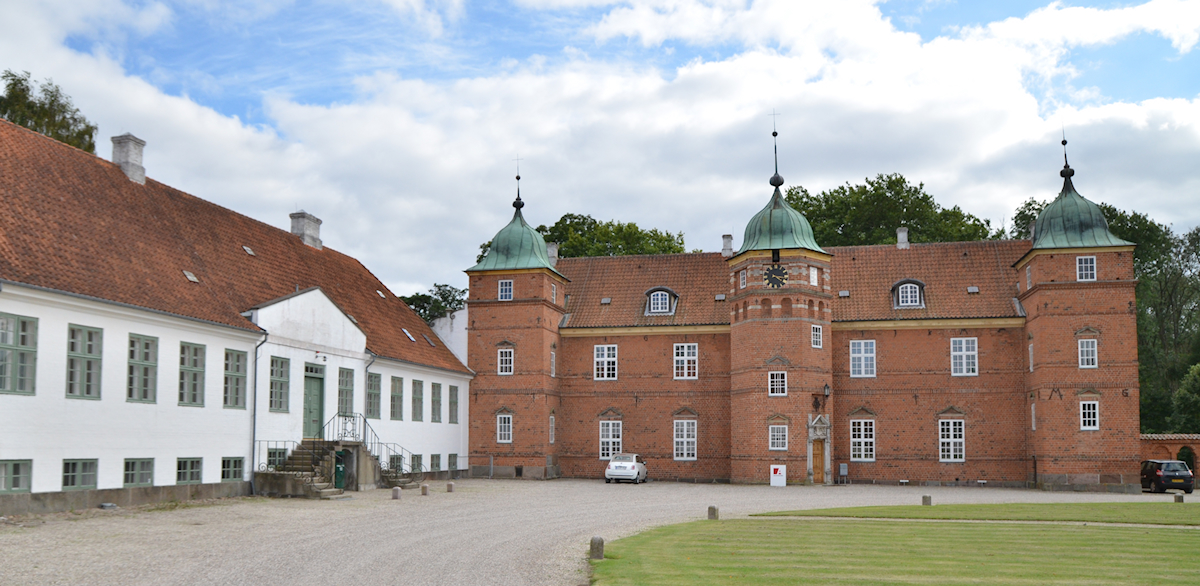 Hollufgaard i 2012